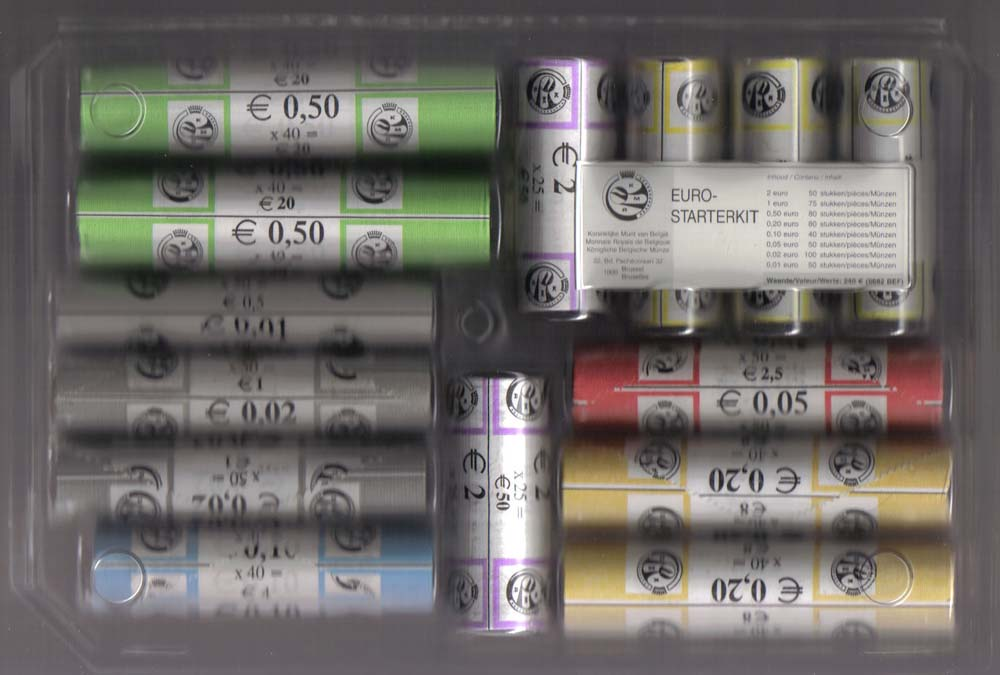 Tubos con monedas de euro